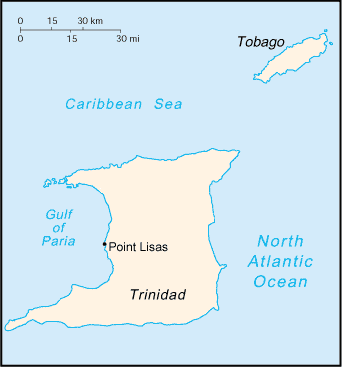 Point Lisas